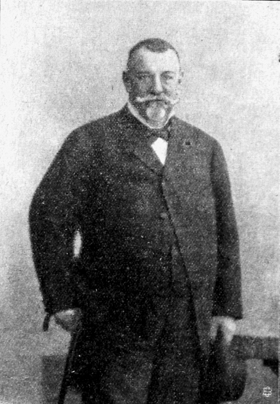 Hermann Fehling, dem als Präses der Handelskammer die Ehrendenkmünze der Handelskammer verliehen wurde.